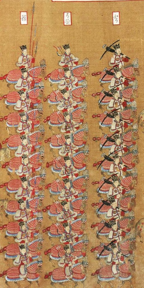 《大驾卤薄图》中之宋朝骑兵图